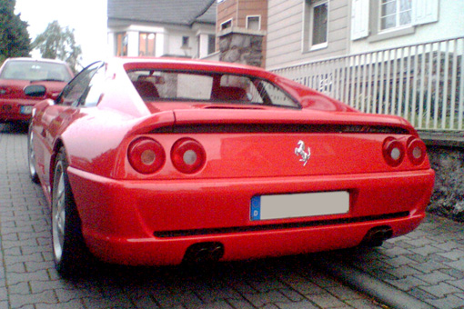 Ferrari 355 F1 Berlinetta